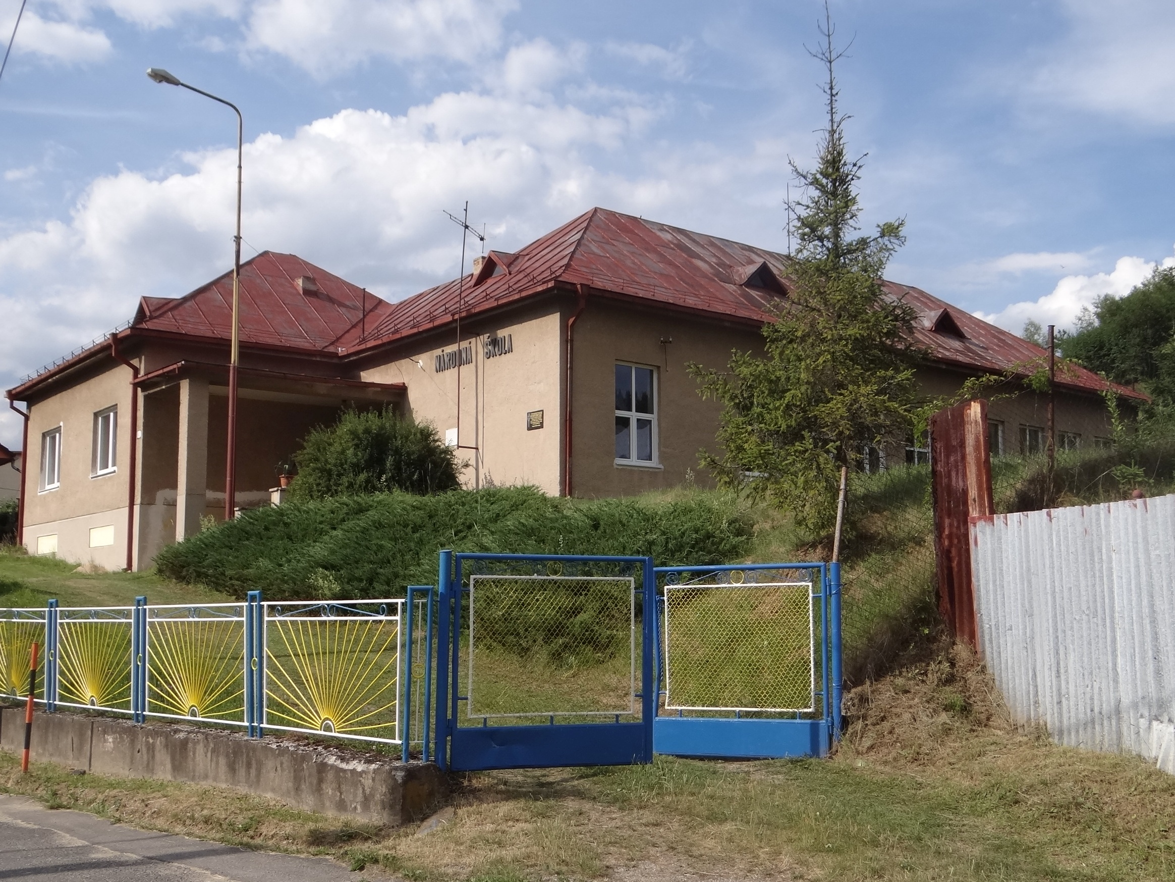 Lacková